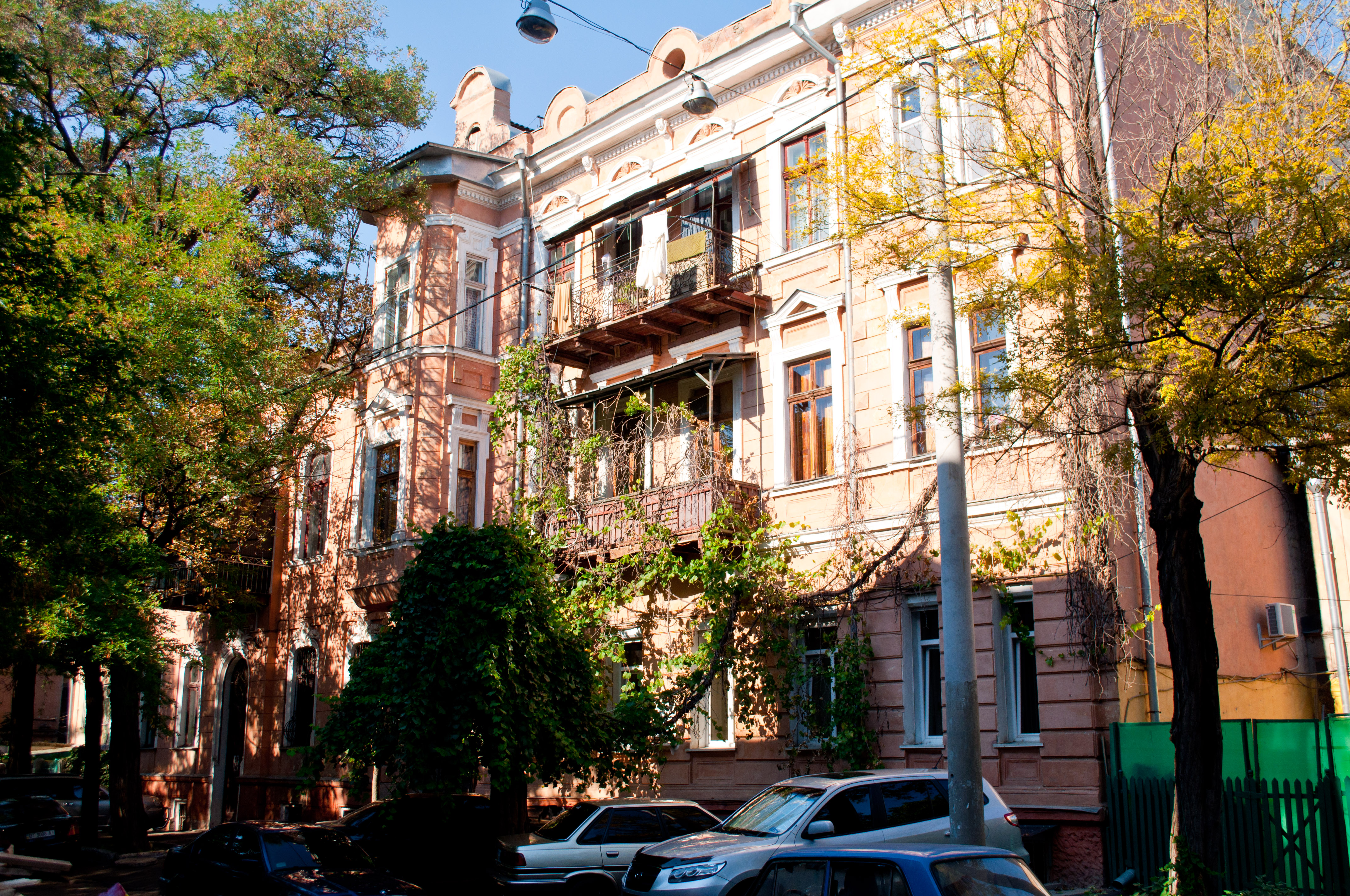 Будинок прибутковий. Будинок (праворуч від воріт), в якому у 1917 р. жив П.Ф. Старостін - організатор профспілки металістів, один з організаторів Червоної гвардії у м. Одесі.